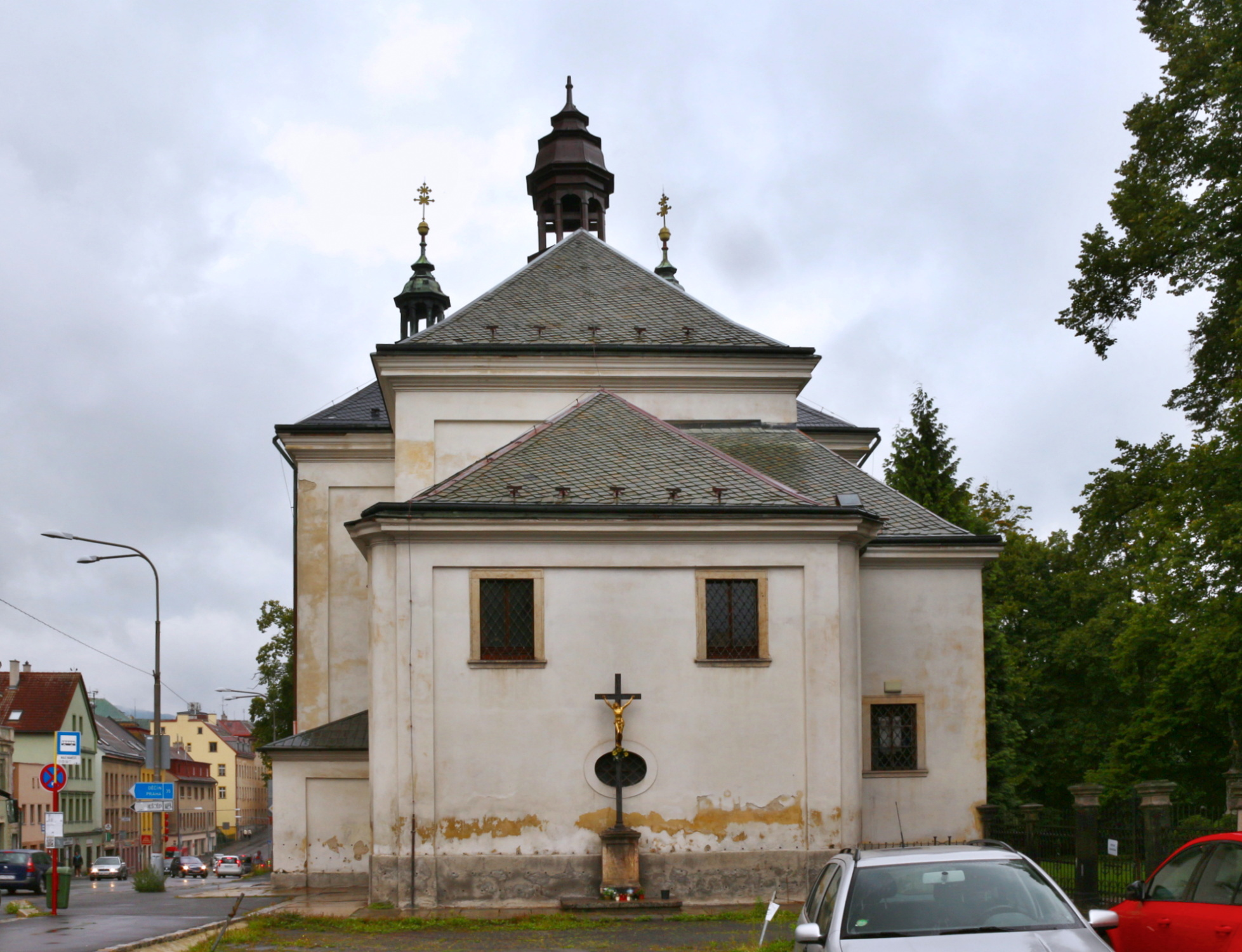 Liberecký kostel Nalezení sv. Kříže